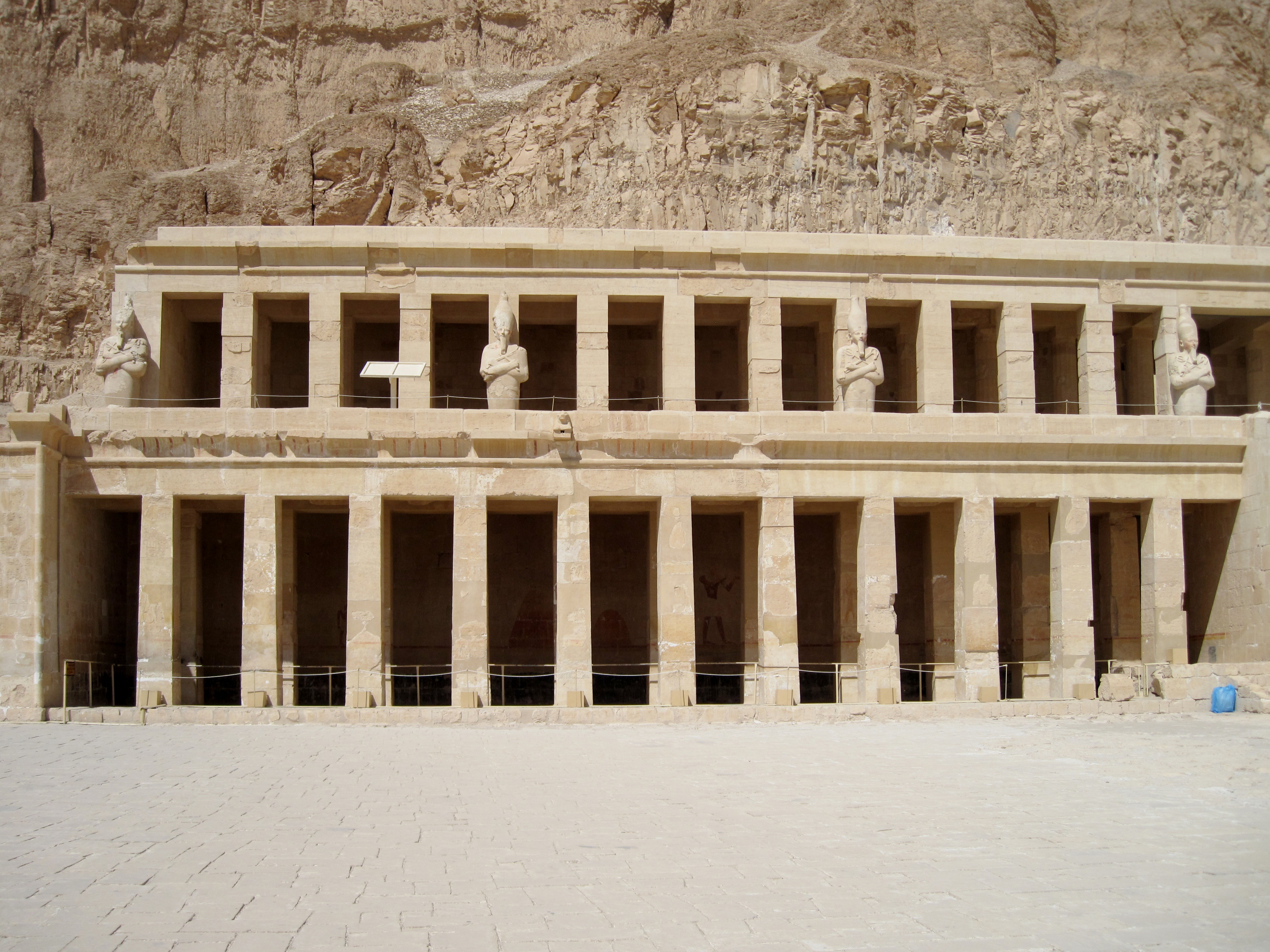 Pfeilergang von Punt im Totentempel der Hatschepsut in Deir el-Bahari nordwestlich von Luxor, Ägypten